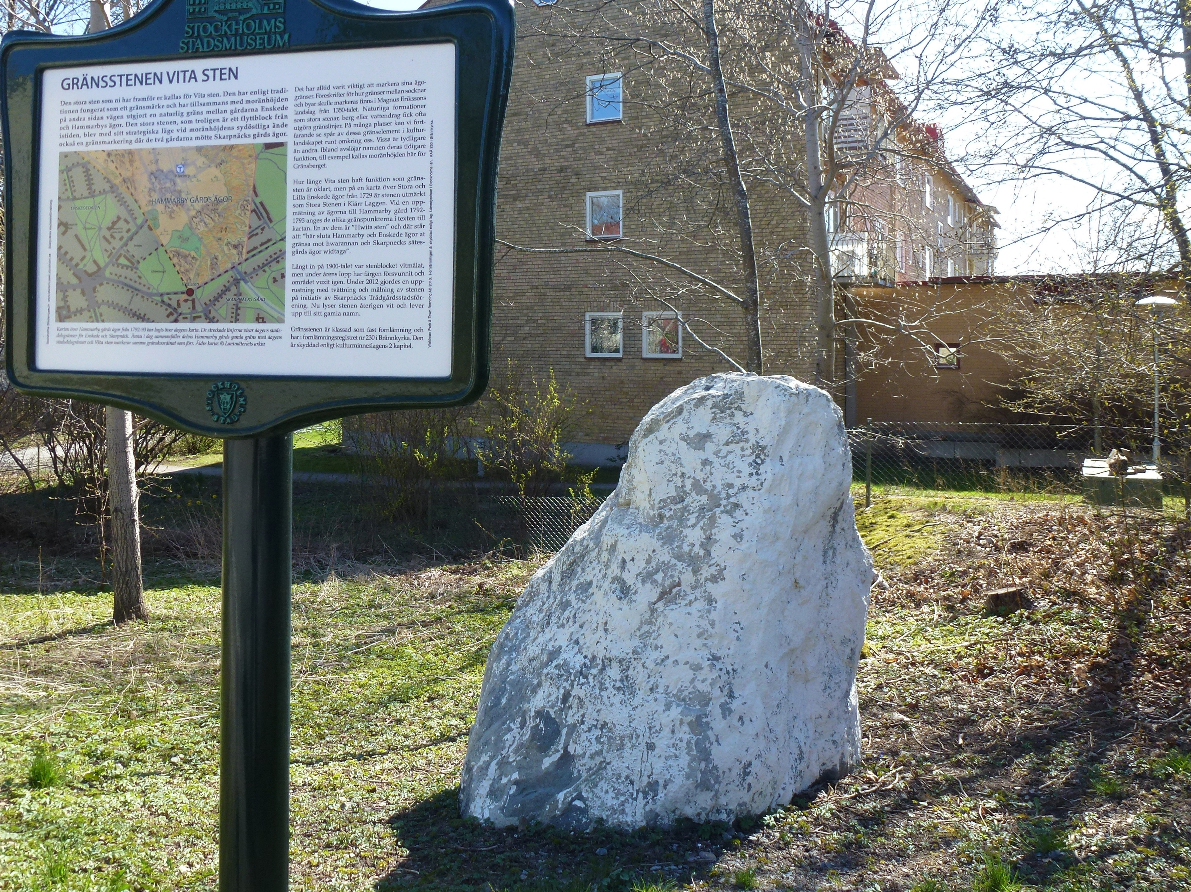 Gränsstenen "Vita stenen", som angav en gränsmarkering där de två gårdarna Enskede gård och Hammarby gård mötte Skarpnäcks gårds ägor.